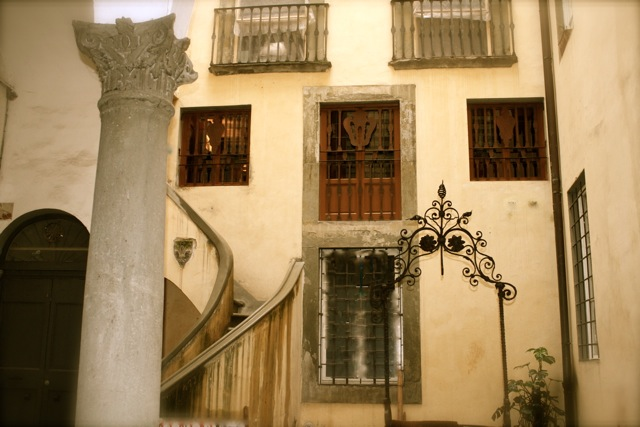 Palazzo dami, corte interna